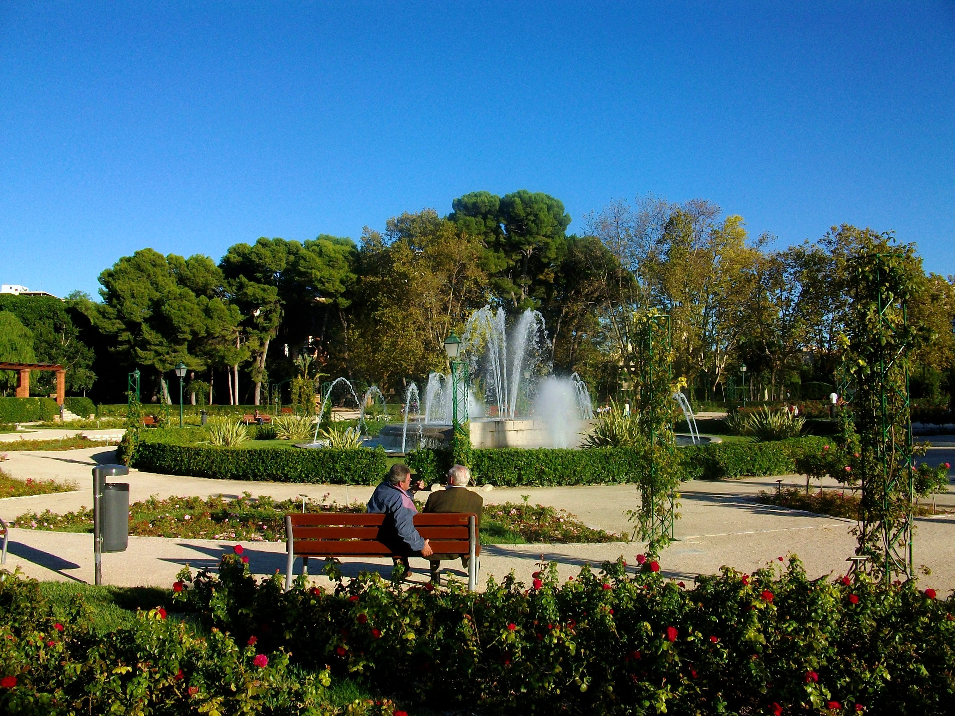 Roserar del Jardí de Vivers o del Real, València.